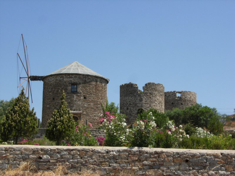 Datça girişindeki yel değirmenleri